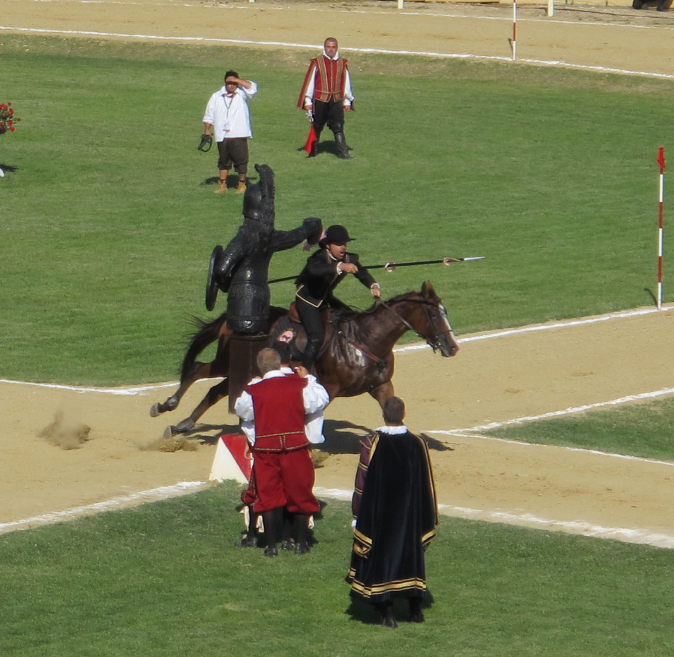 Quintana di foligno, giostra